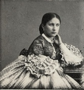 Екатерина Дмитриевна Замятнина (1842 — после 1918), жена А. Н. Куломзина